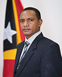 Óscar de Araújo, Abgeordneter des Nationalparlaments Osttimros